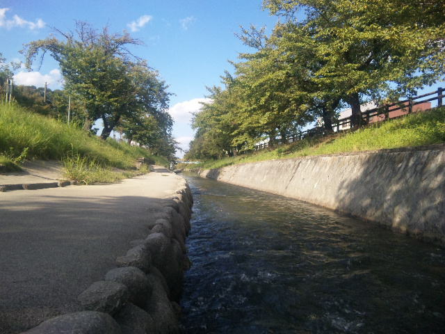 奈良県高田川。